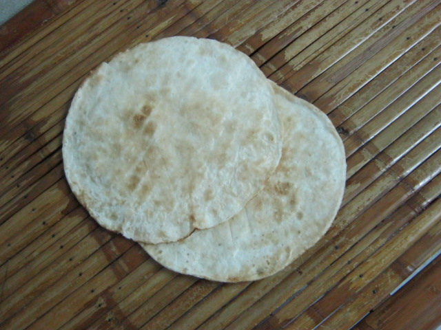 ข้าวโป่ง ข้าวควบ